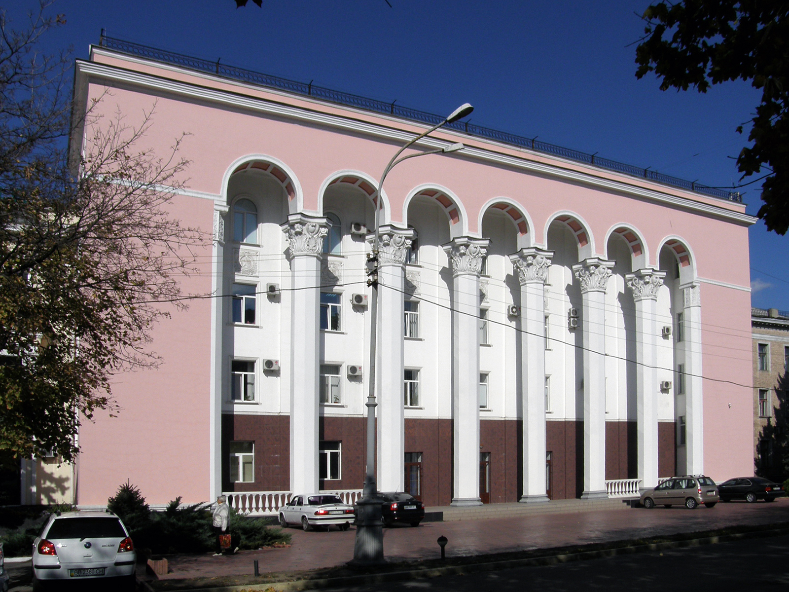 Луганск